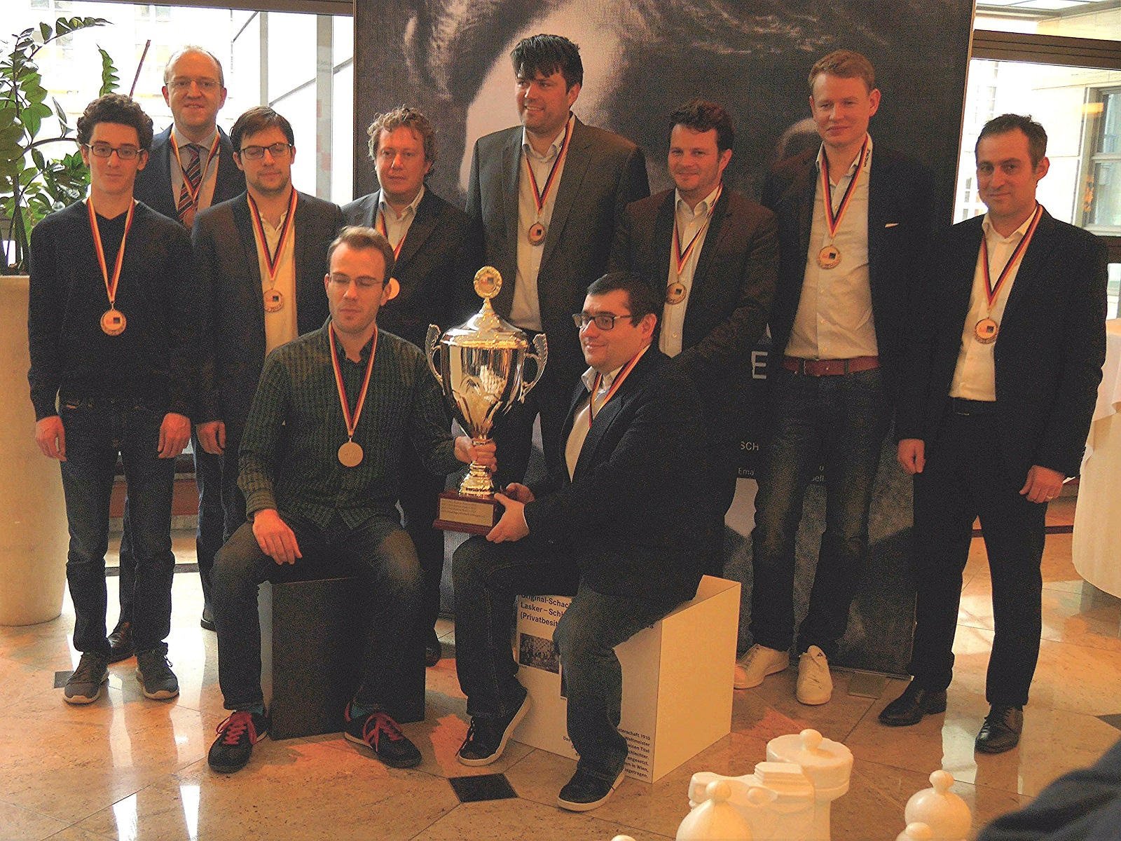 Die Mannschaft der OSG Baden-Baden (Gewinner der deutschen Schachbundesliga), Finalrunden der deutschen Schachbundesliga 2017 in Berlin.